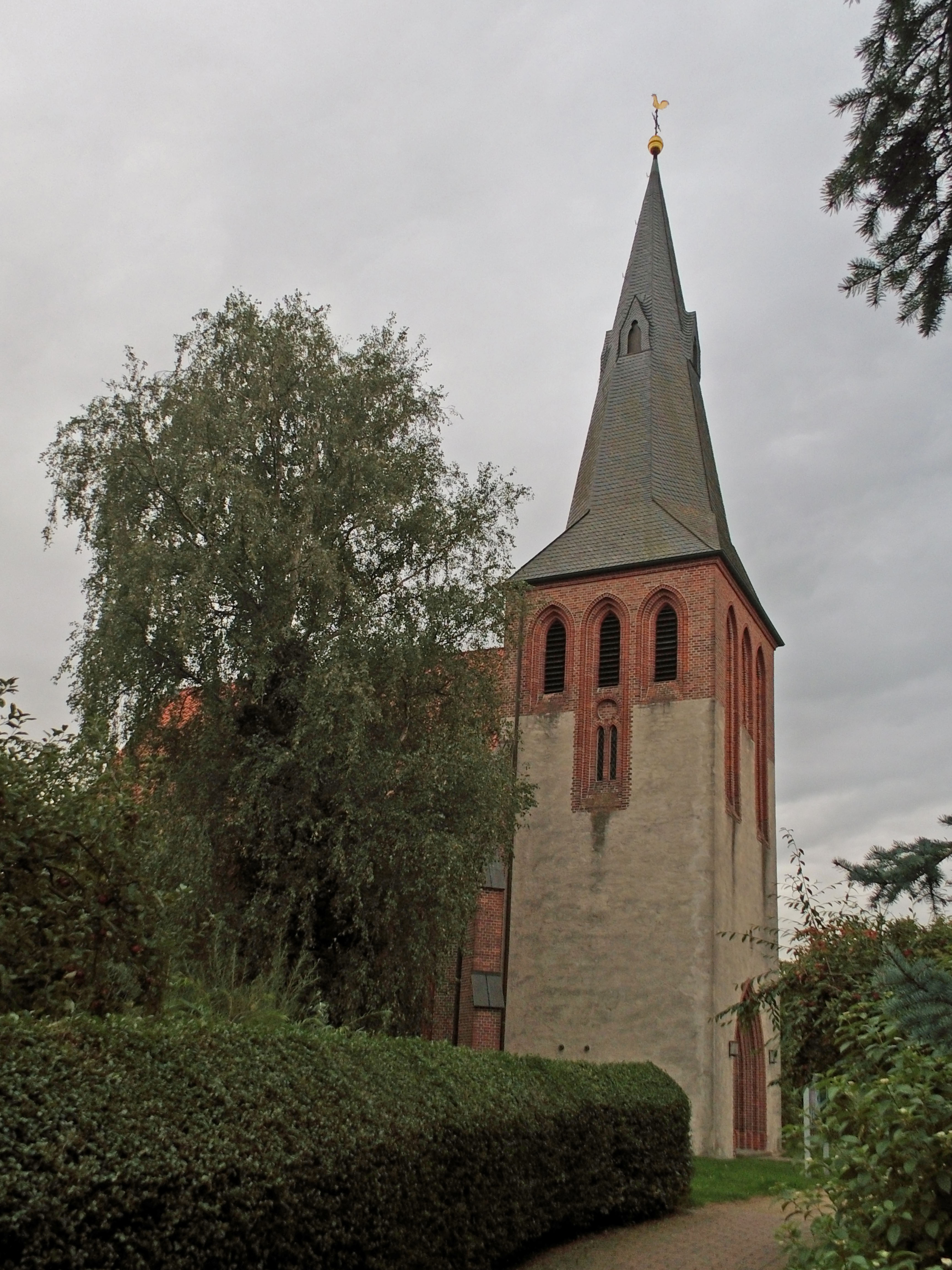 Evangelisch-lutherische St.-Vincenz-Kirche in Grassel (Landkreis Gifhorn).